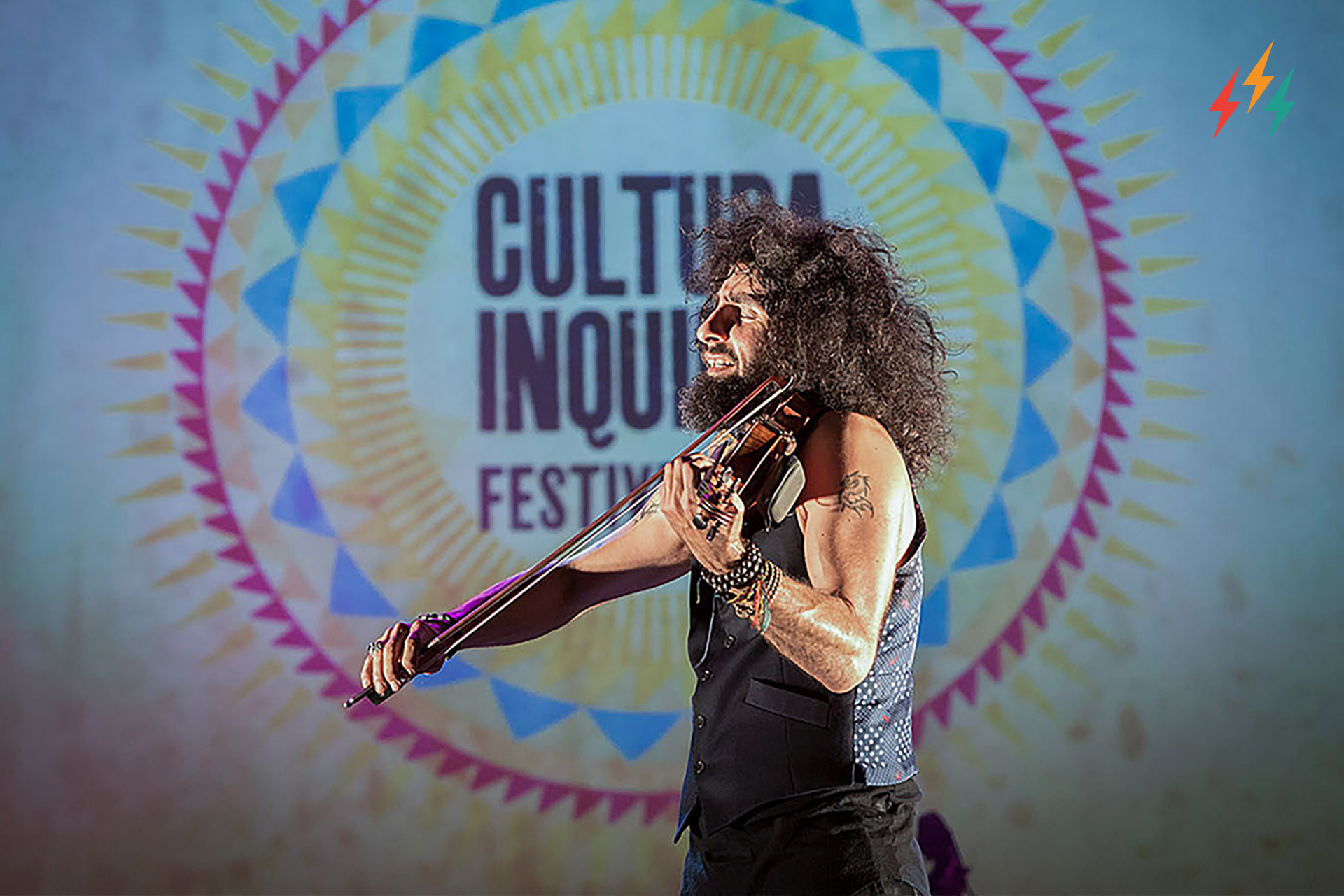 Actuación de Ara Malikian en el Festival Cultura Inquieta